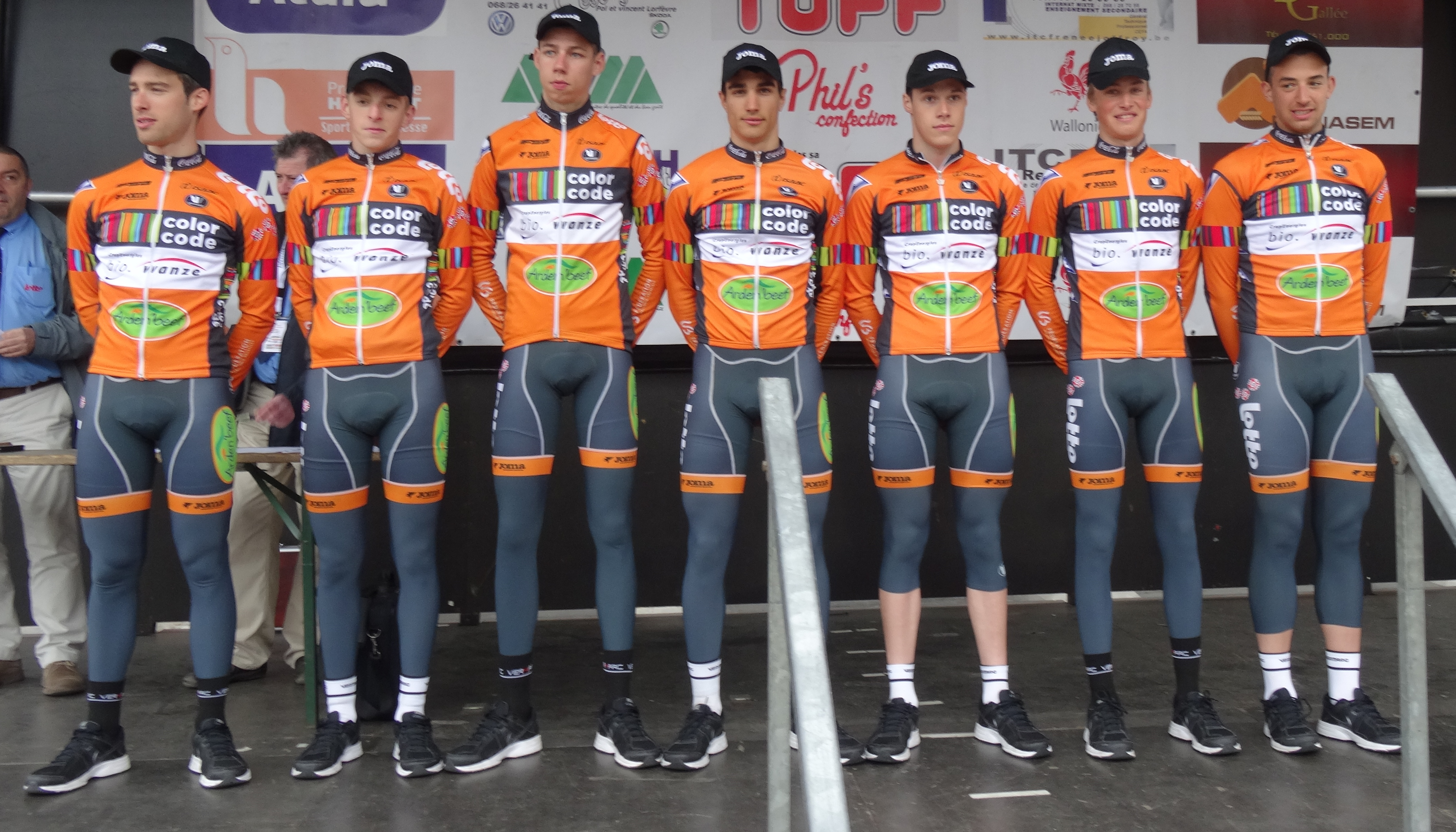 Triptyque des Monts et Châteaux 2014, étape 1, 4 avril 2014, départ d'Antoing. Depicted people: Thomas Wertz, Julien Kaise, Ludovic Robeet, Antoine Warnier, Maximilien Picoux, Florent Delfosse and Ludwig De Winter Depicted team: Color Code-Biowanze The creation of these files was made possible thanks to the organizers of the Triptyque des Monts et Châteaux 2014 English | français | +/−